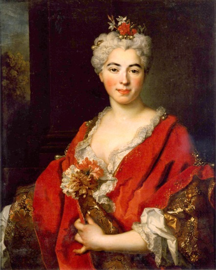 Depicted person: Marguerite de Largilliere (daughter of Nicolas de Largillière)